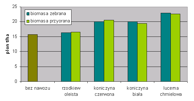 wg E. Bogusławski graphics: Gimp2